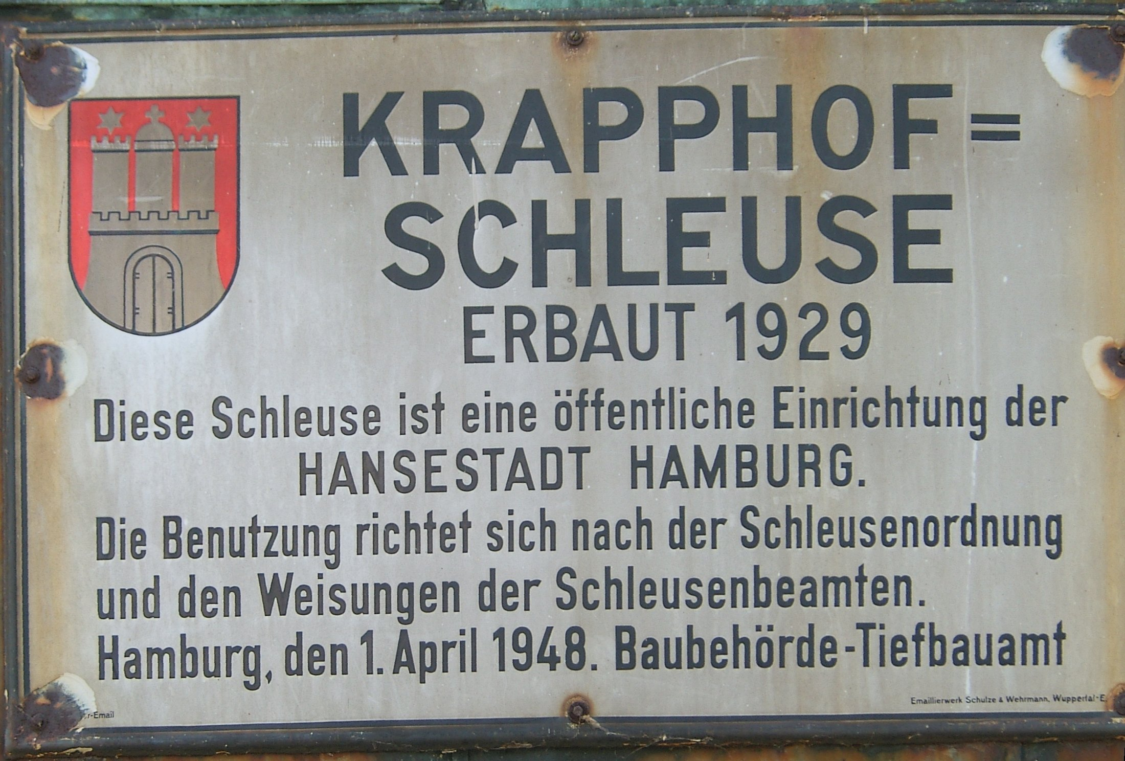 Hamburg, Altengamme, Krapphofschleuse, Schild